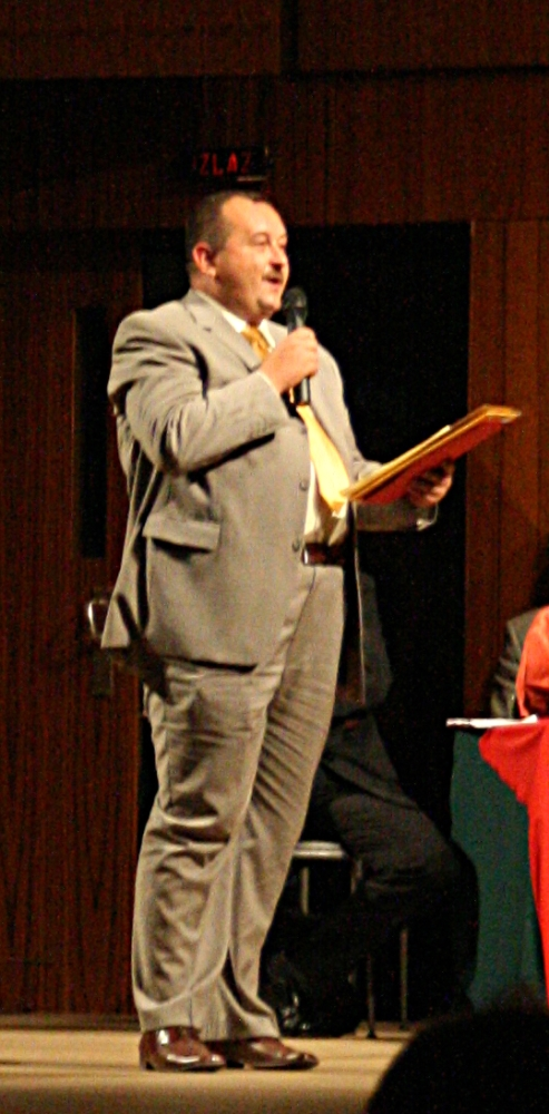 Dobrotvorni koncert "Križ nek' ti sačuva ime" u koncertnoj dvorani Vatroslav Lisinski u Zagrebu.